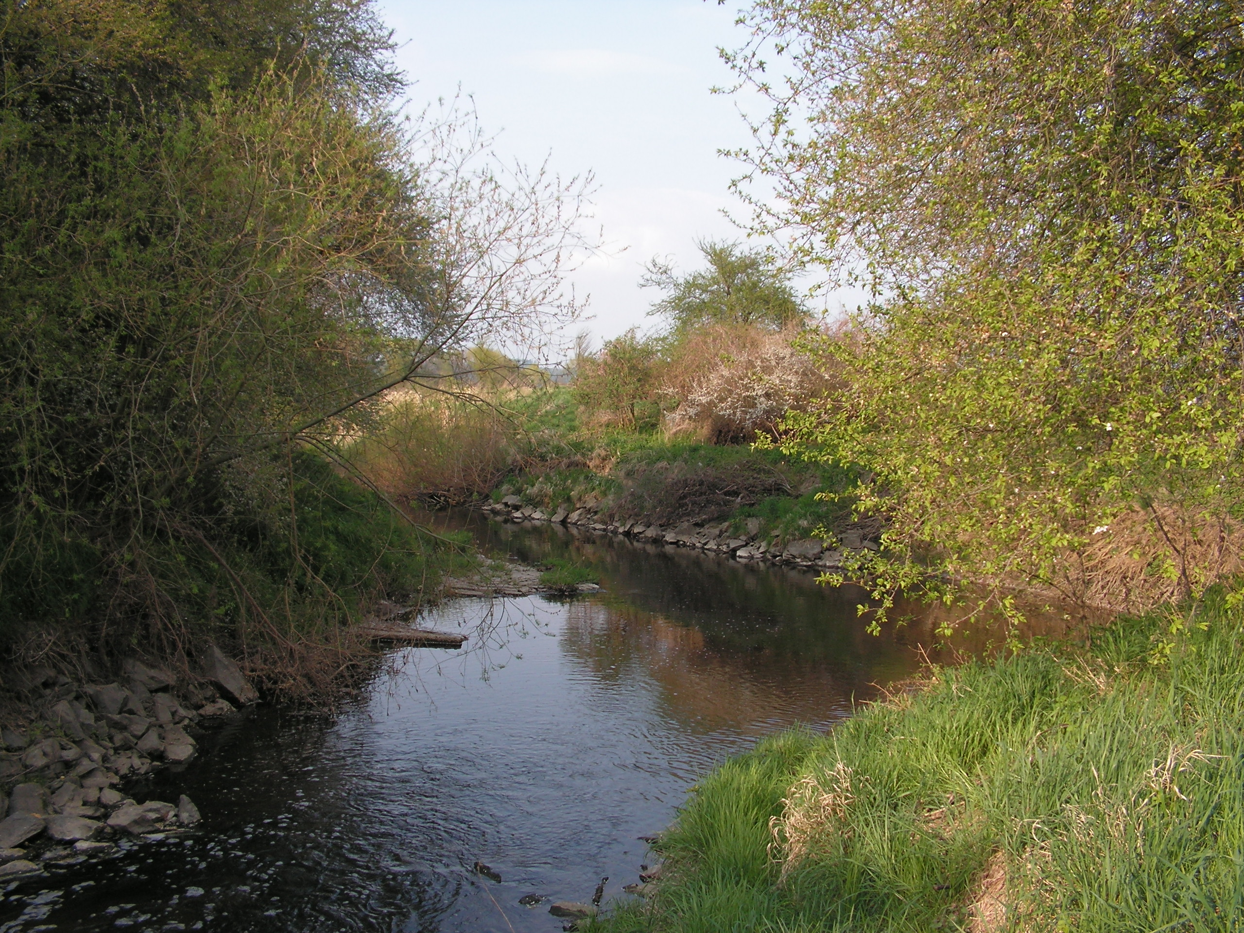 Ústí Brslenky do Doubravy severně od Žehušic v okrese Kutná Hora